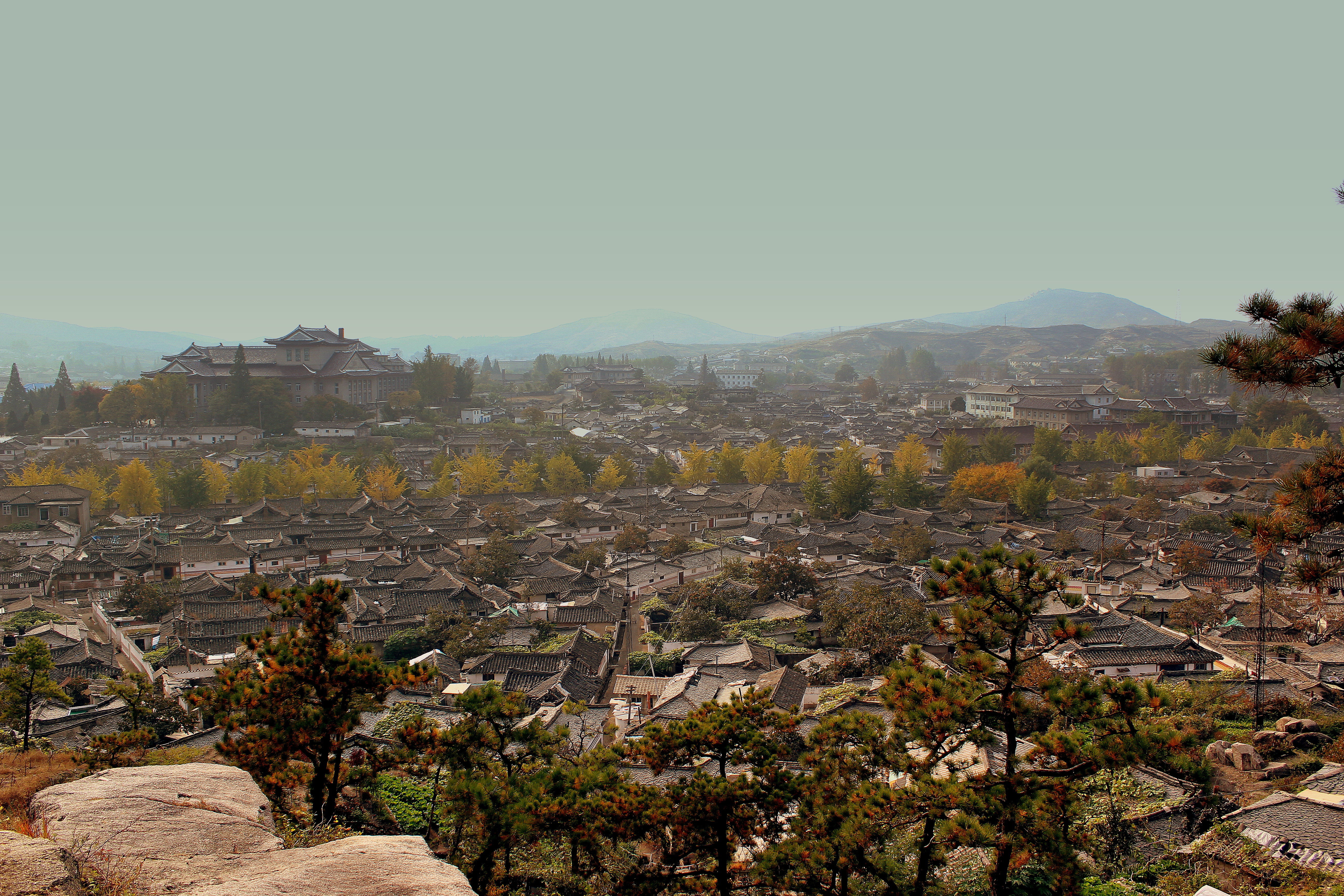 VIEW OF KAESONG CITY DPR KOREA OCT 2012